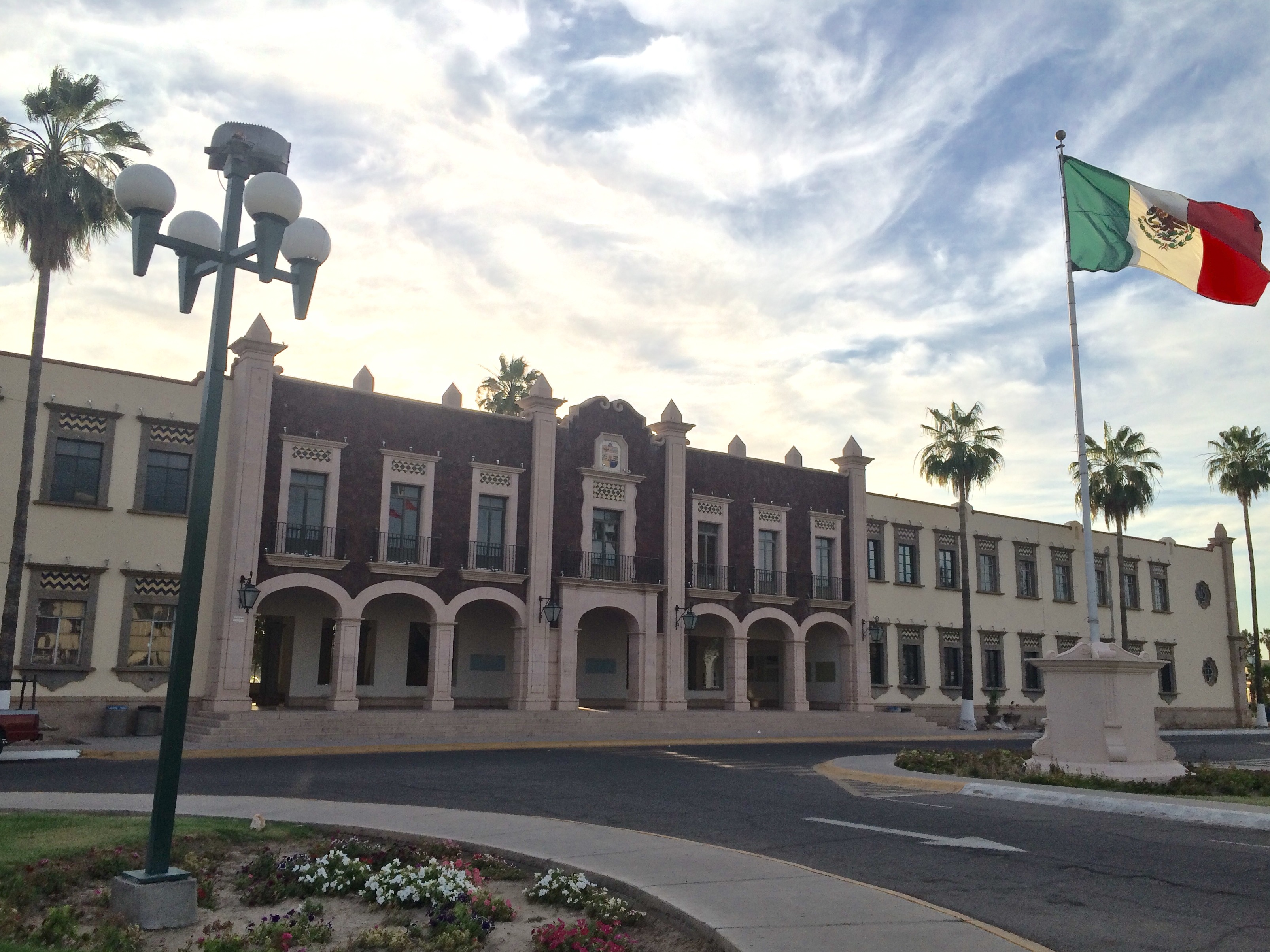 El edificio principal de la Universidad de Sonora, Unidad Regional Centro, en Hermosillo, Sonora, México. (Rectoría)